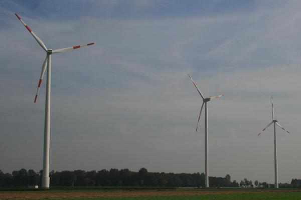 Windkraftanlage in Wegberg-Petersholz